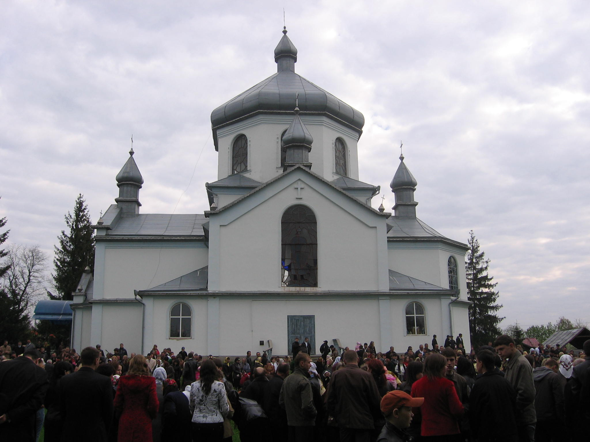 Михайлівська церква у Вікні